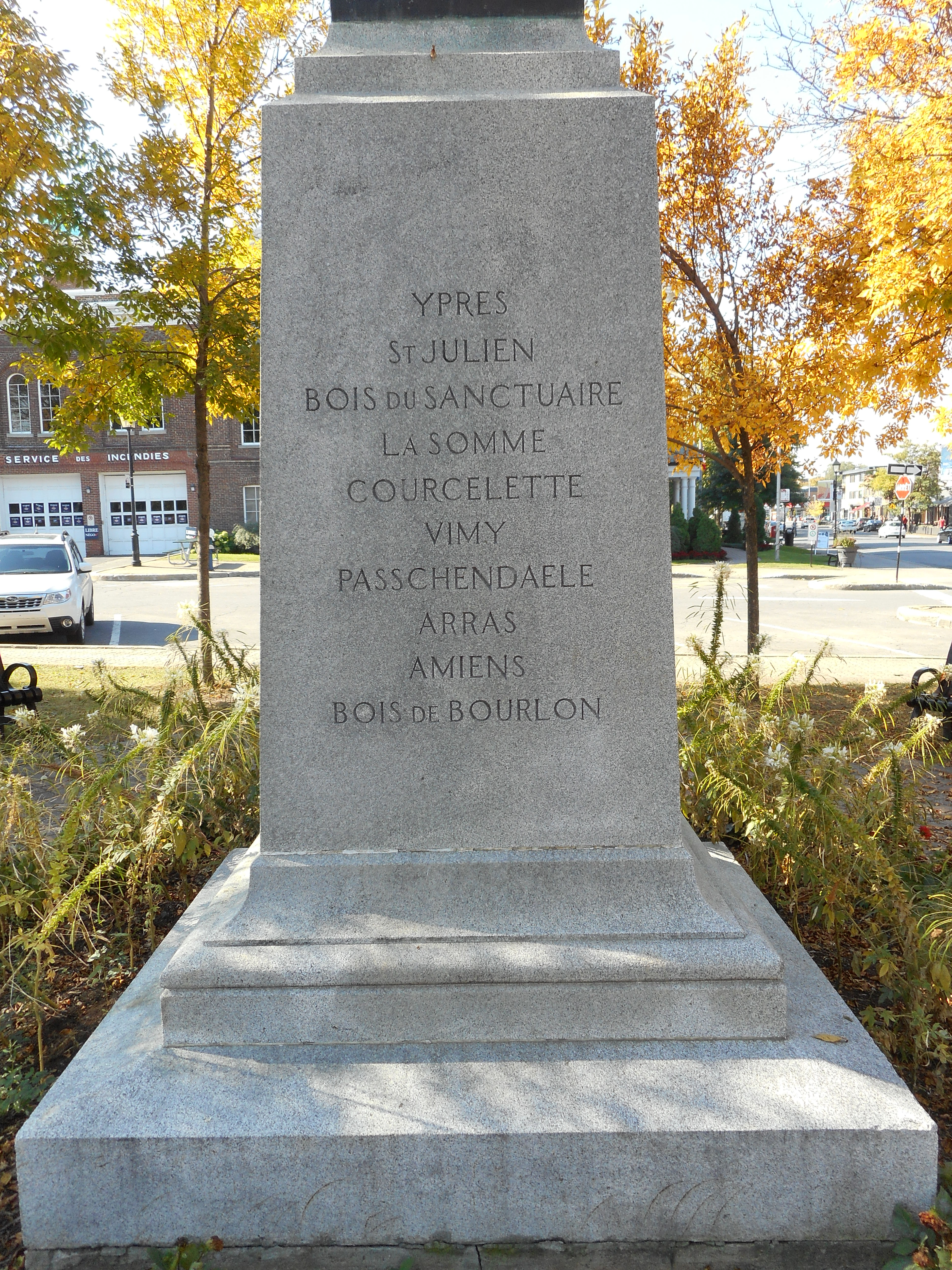 Le Monument aux Braves, situé depuis 1923 dans le parc Saint-Jean-Baptiste, à Longueuil, est l'oeuvre du sculpteur Émile Brunet. Face est :« YpresSt-JulienBois du sanctuaireLa SommeCourceletteVimyPasschendaeleArrasAmiensBois de Bourlon »